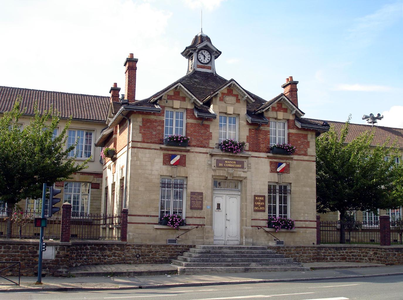 L'ancienne mairie-école à Garges-lès-Gonesse (Val-d'Oise), France